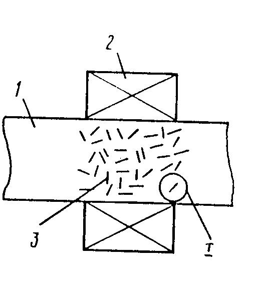 Перемішувач. Схема